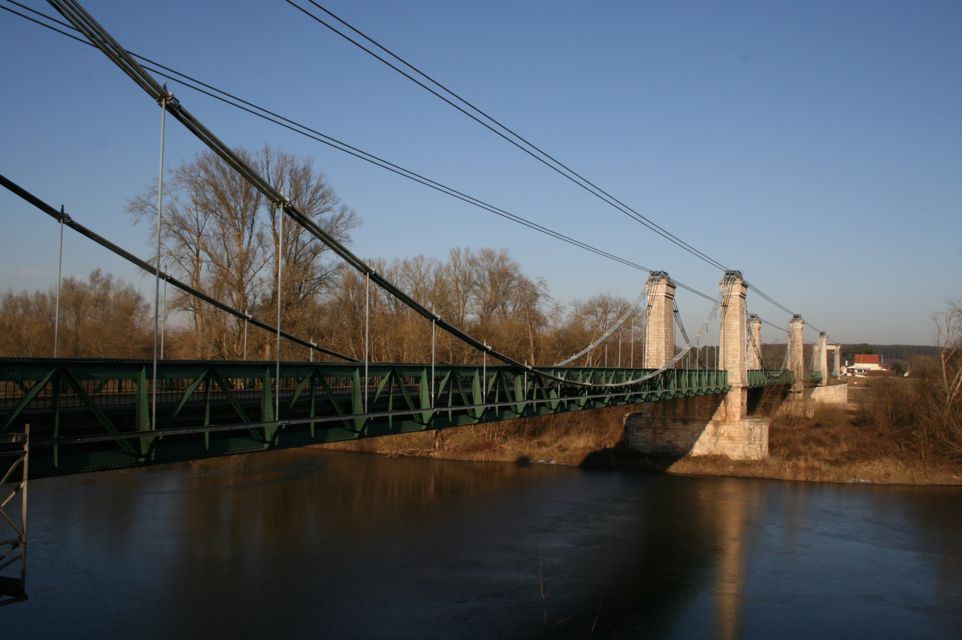 Pont de Châtillon-sur-Loire (Loiret - France) - Pont suspendu franchissant la Loire - Vue de la travée latérale rive gauche.